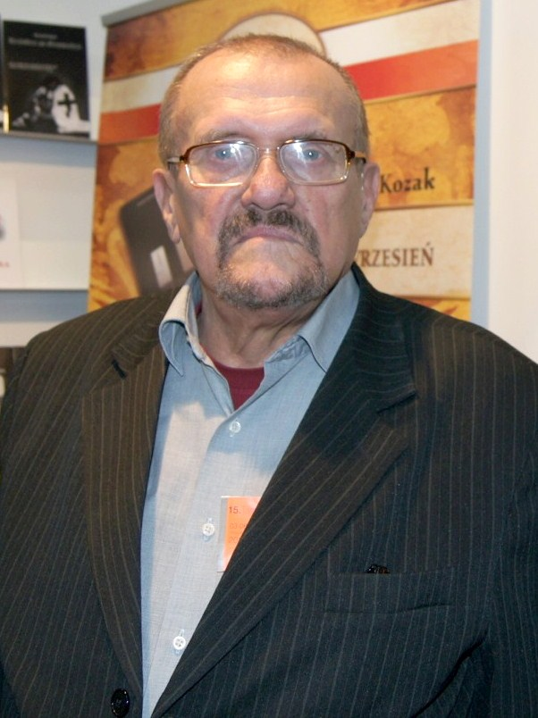 Ryszard Filipski, aktor i reżyser.